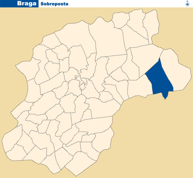 Localização de Sobreposta no concelho de Braga.